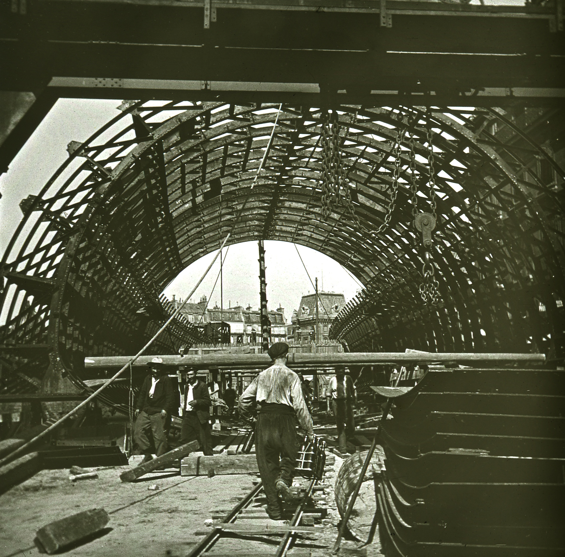 Metropolitain de Paris : Finalisation de la structure métallique de la station Saint-Michel.